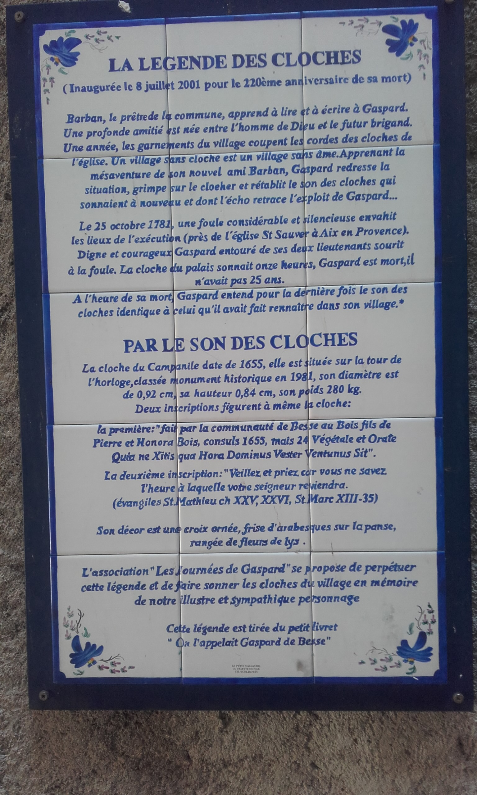 Var, Besse-sur-Issole, la légende des cloches.